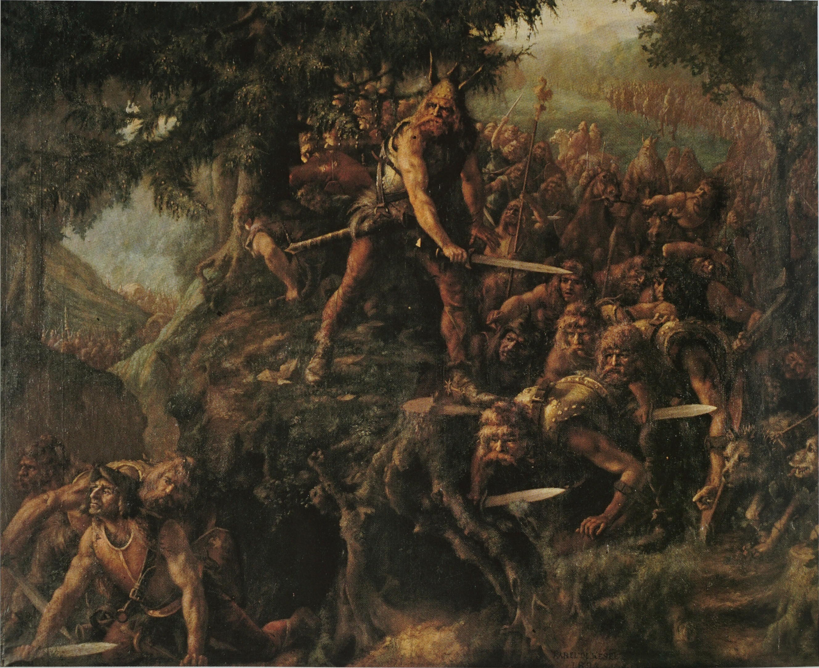 Ambiorix tendant une embuscade à la XIVe slégion romaine.